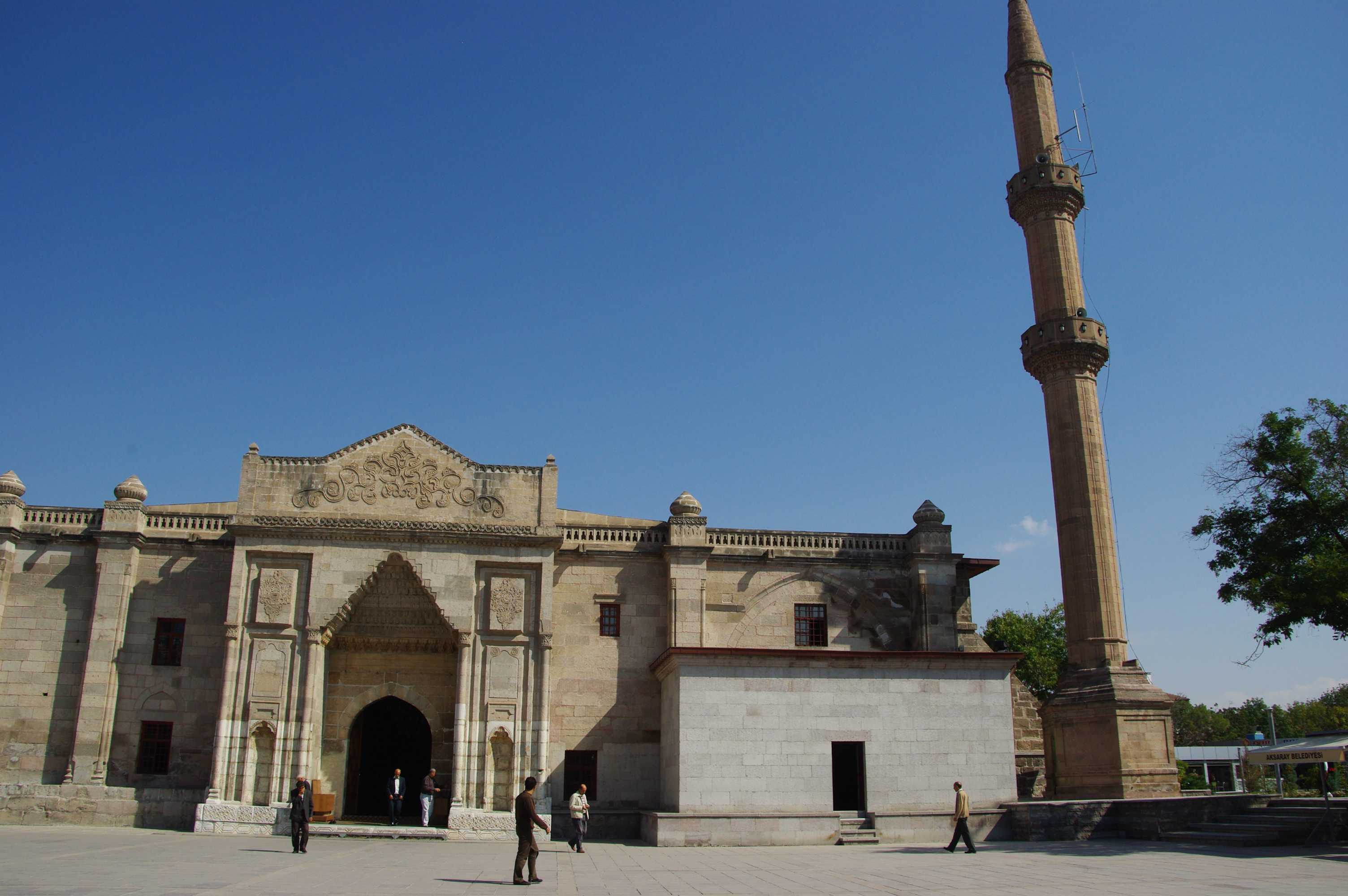 Aksaray Ulu Camii